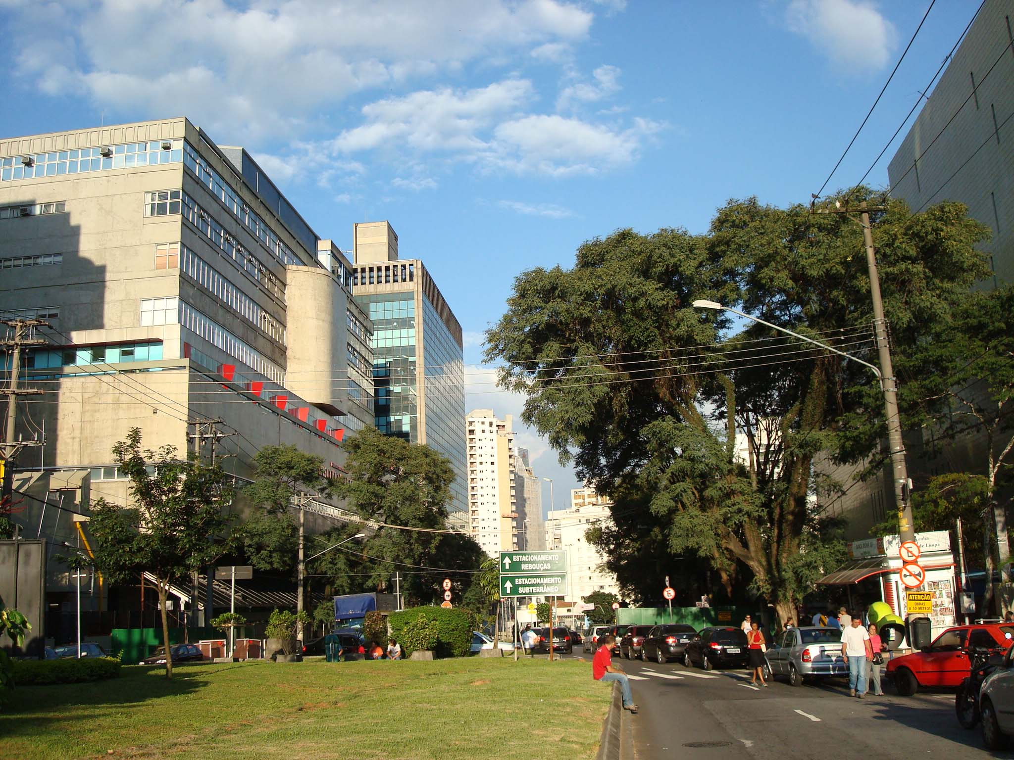 Panorâmica dos institutos no Hospital das Clínicas de São Paulo